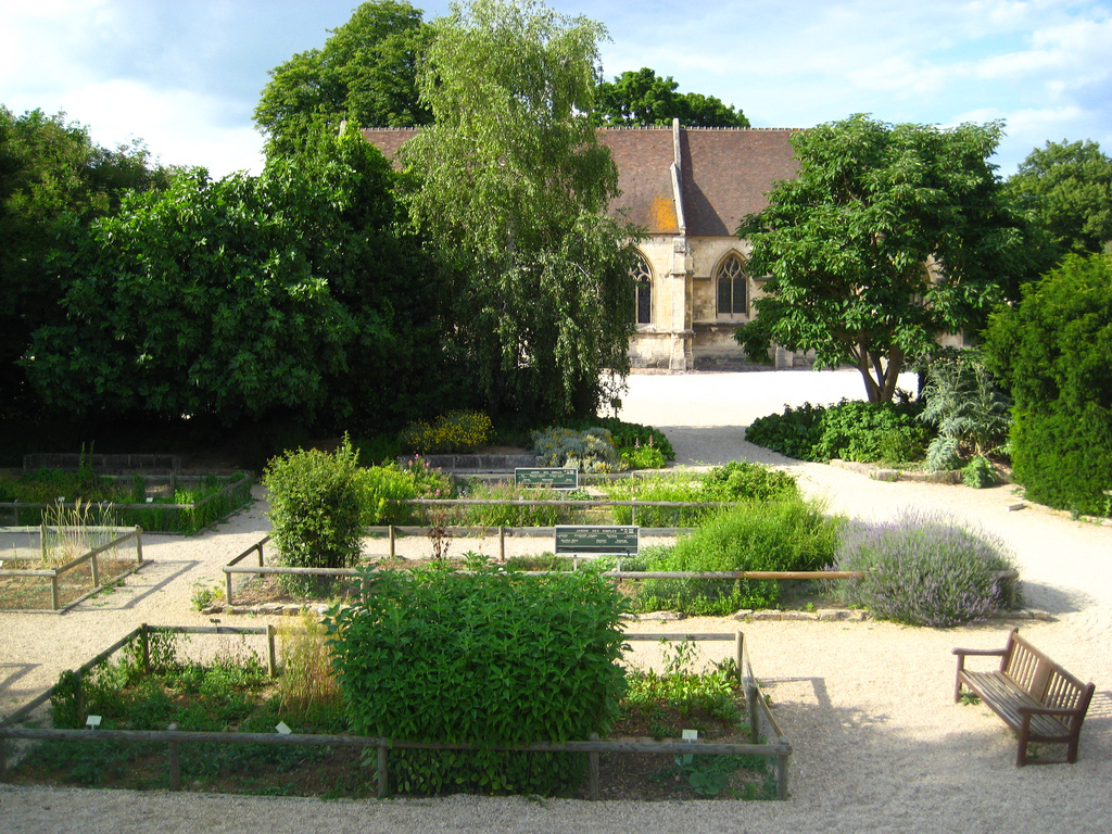 Jardin des Simples dans l'enceinte du château de Caen